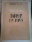 JB-Confusion